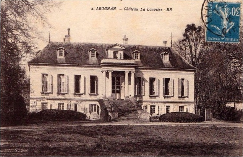 Léognan on post-cards